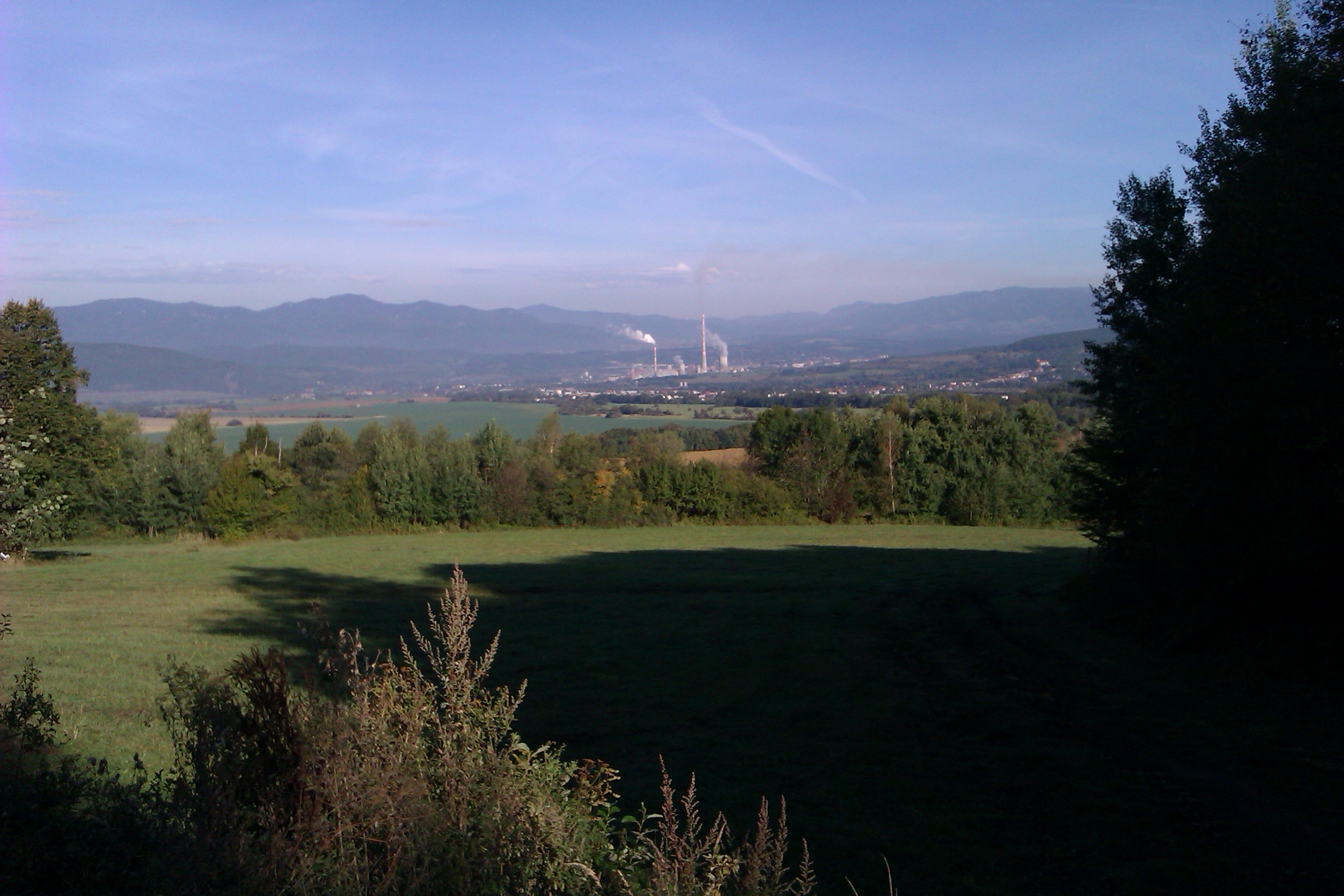 972 45 Bystričany, Slovakia